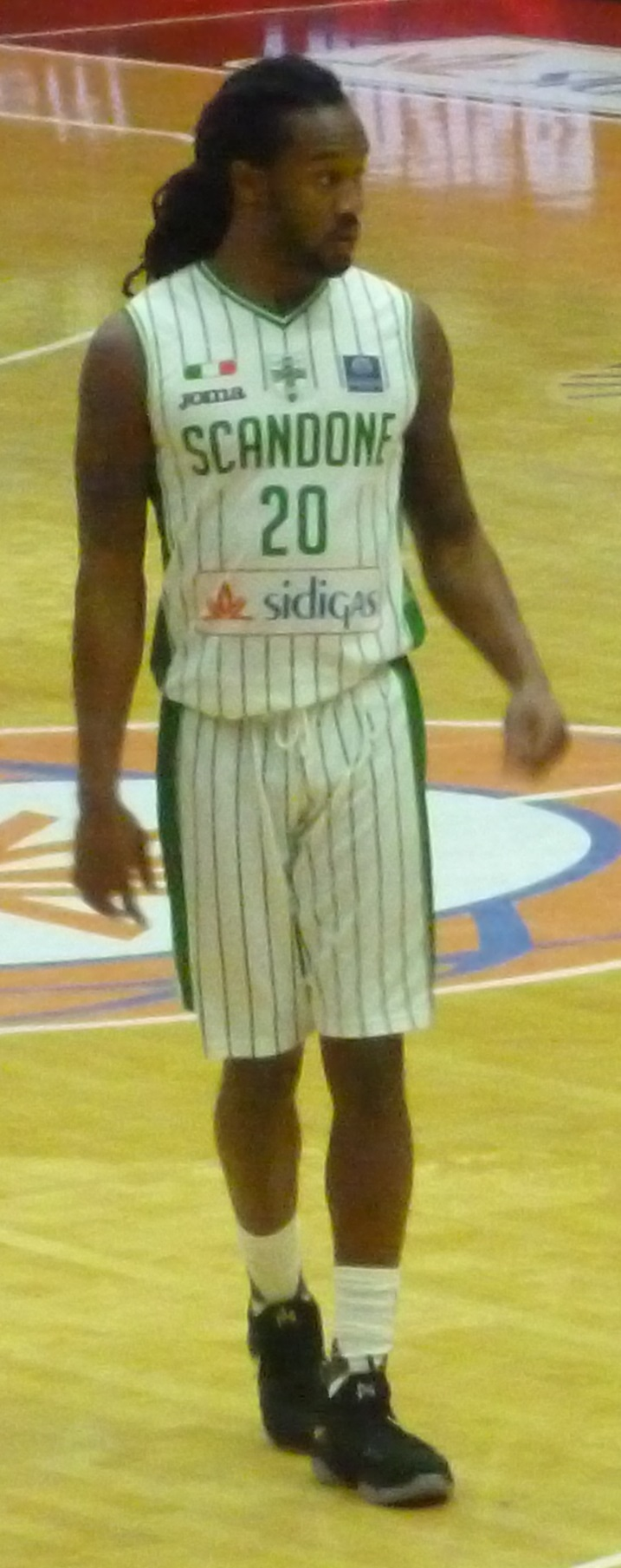 Levi Randolph Società Sportiva Felice Scandone 2016-2017